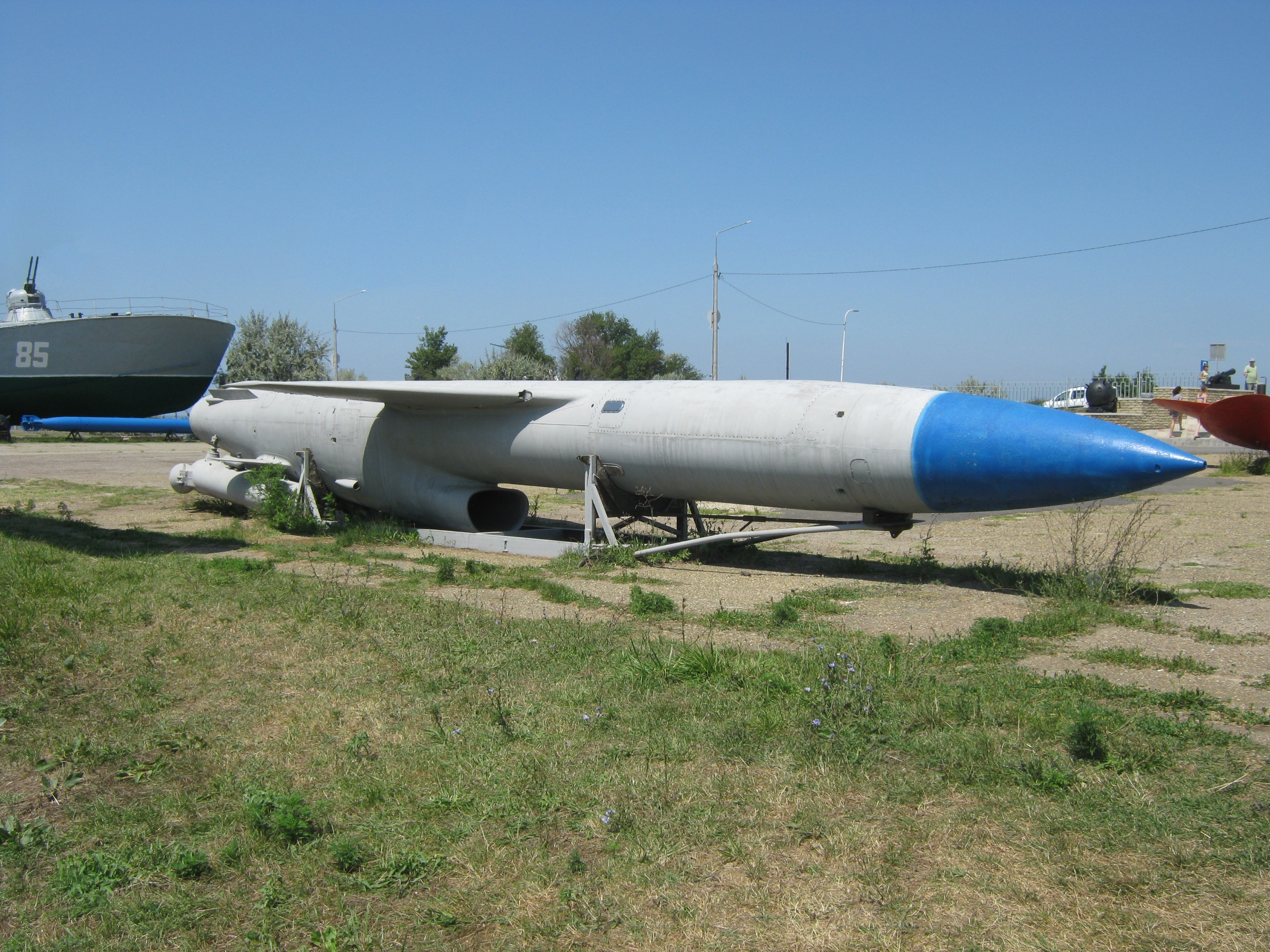 Военная горка (Темрюк)